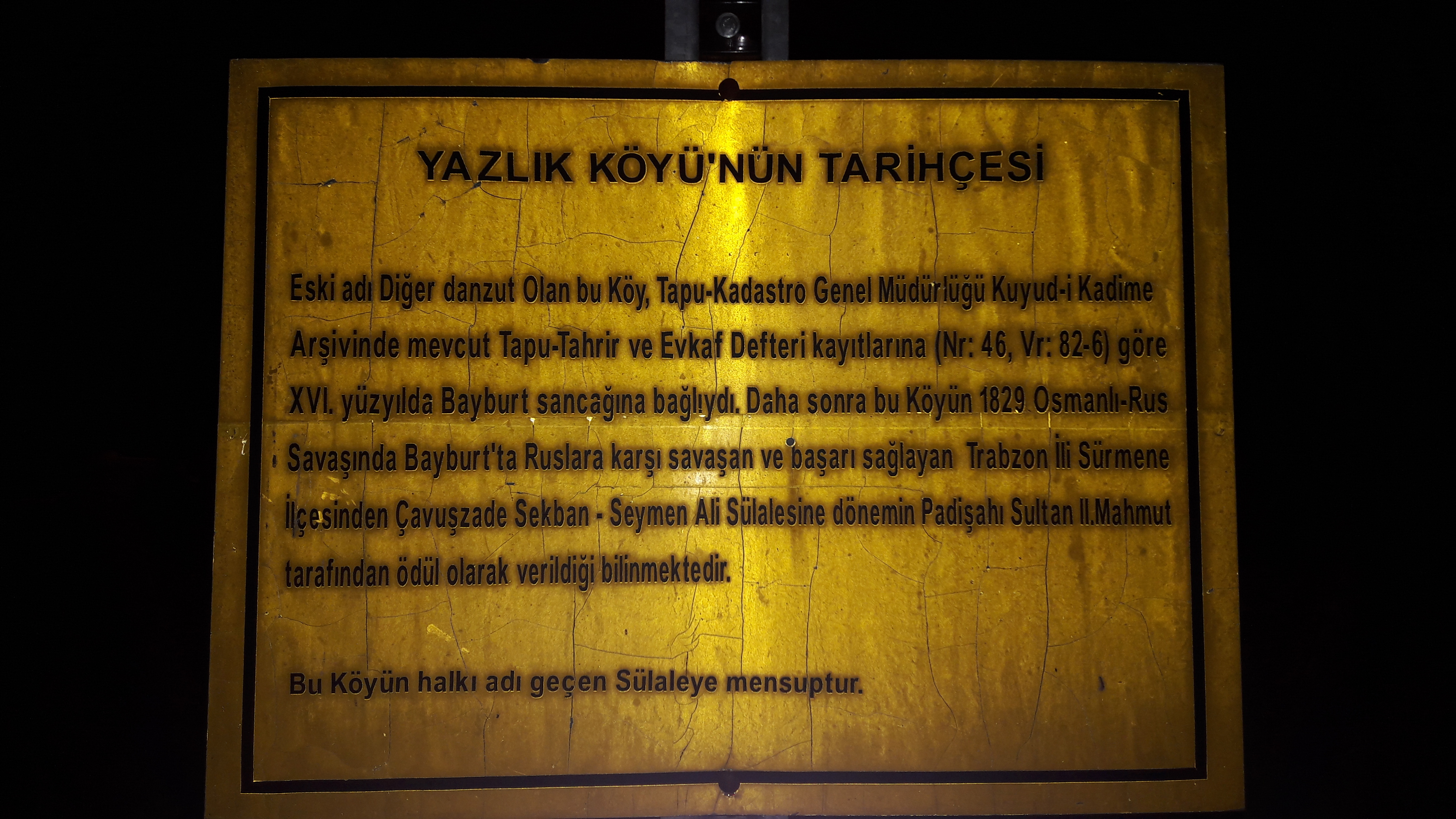 Yazlık köy girişinde bulunan köyün tarihini anlatan tabela